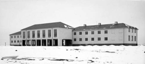 Flygkadettskolan under uppförandet år 1944.